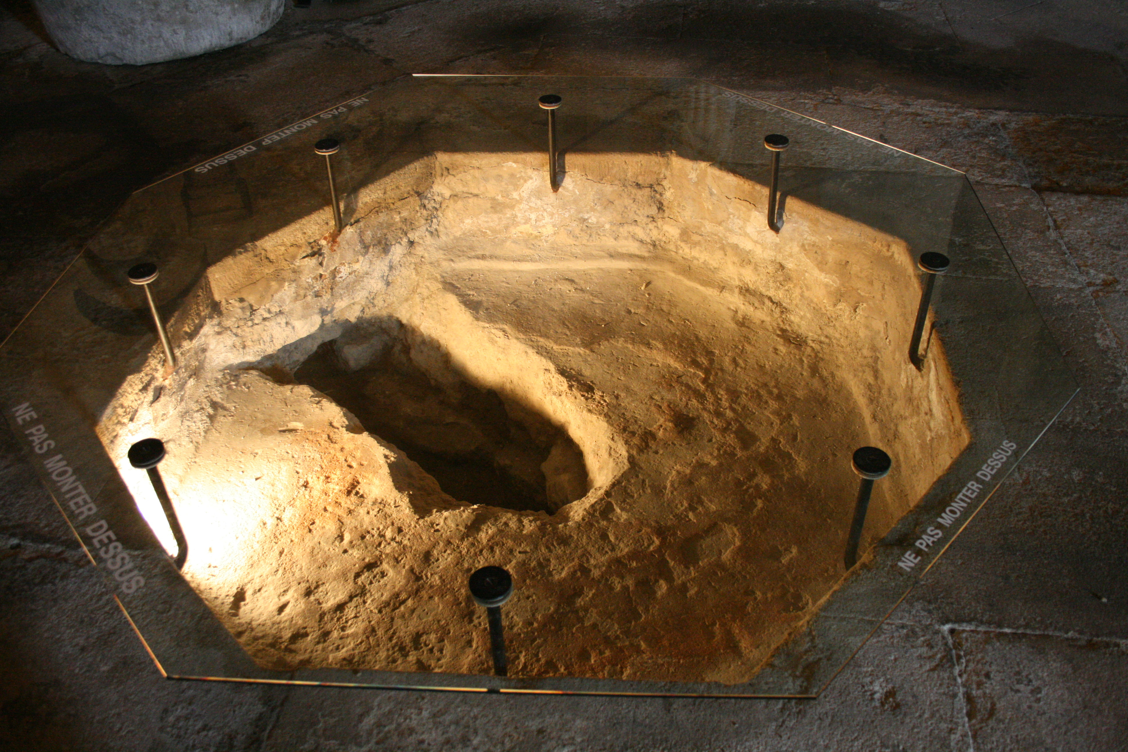 Baptistère de Venasque, département du Vaucluse (France). Cuve baptismale